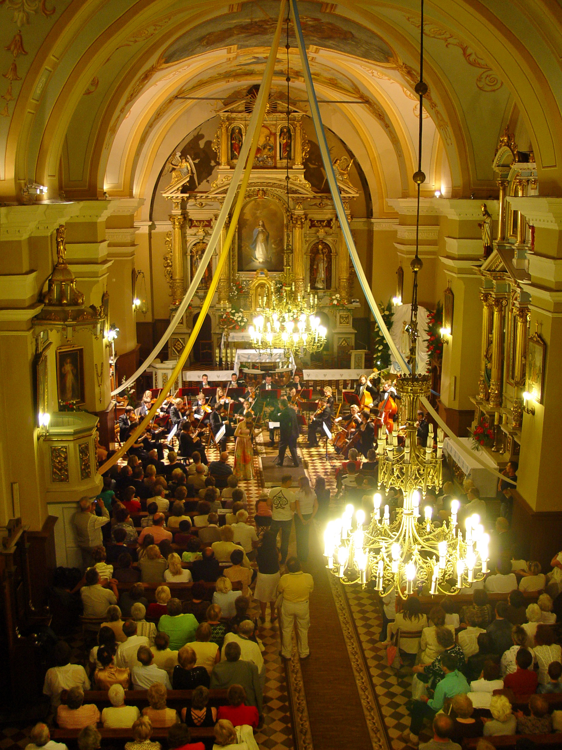 Kościół NPNMP w Busku-Zdroju - koncert Festiwalu Krystyny Jamroz - Anna Maria Staśkiewicz i Polska Orkiestra Sinfonia Iuventus pod dyrekcją Jerzego Swobody, Busko-Zdrój, 29 czerwca 2008 r.